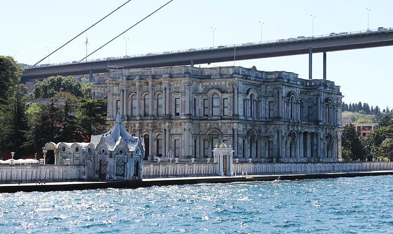 Vista do Palácio Beylerbeyi a partir do Bósforo